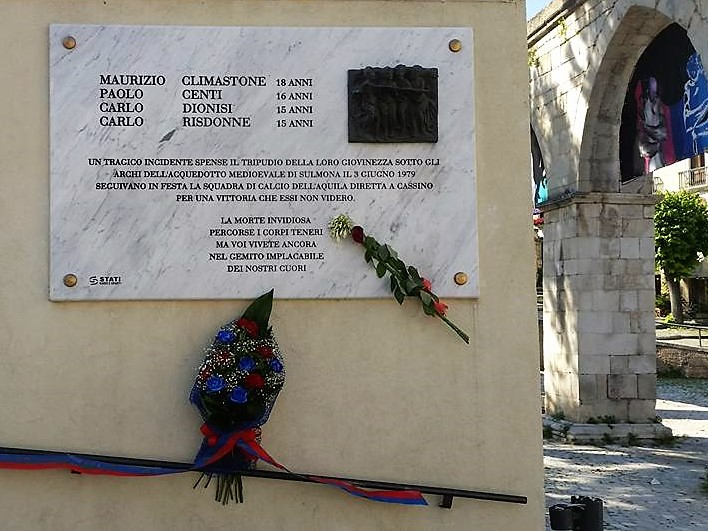 Targa relativa alla tragedia di Sulmona del 3 giugno 1979, apposta in largo Faraglia.